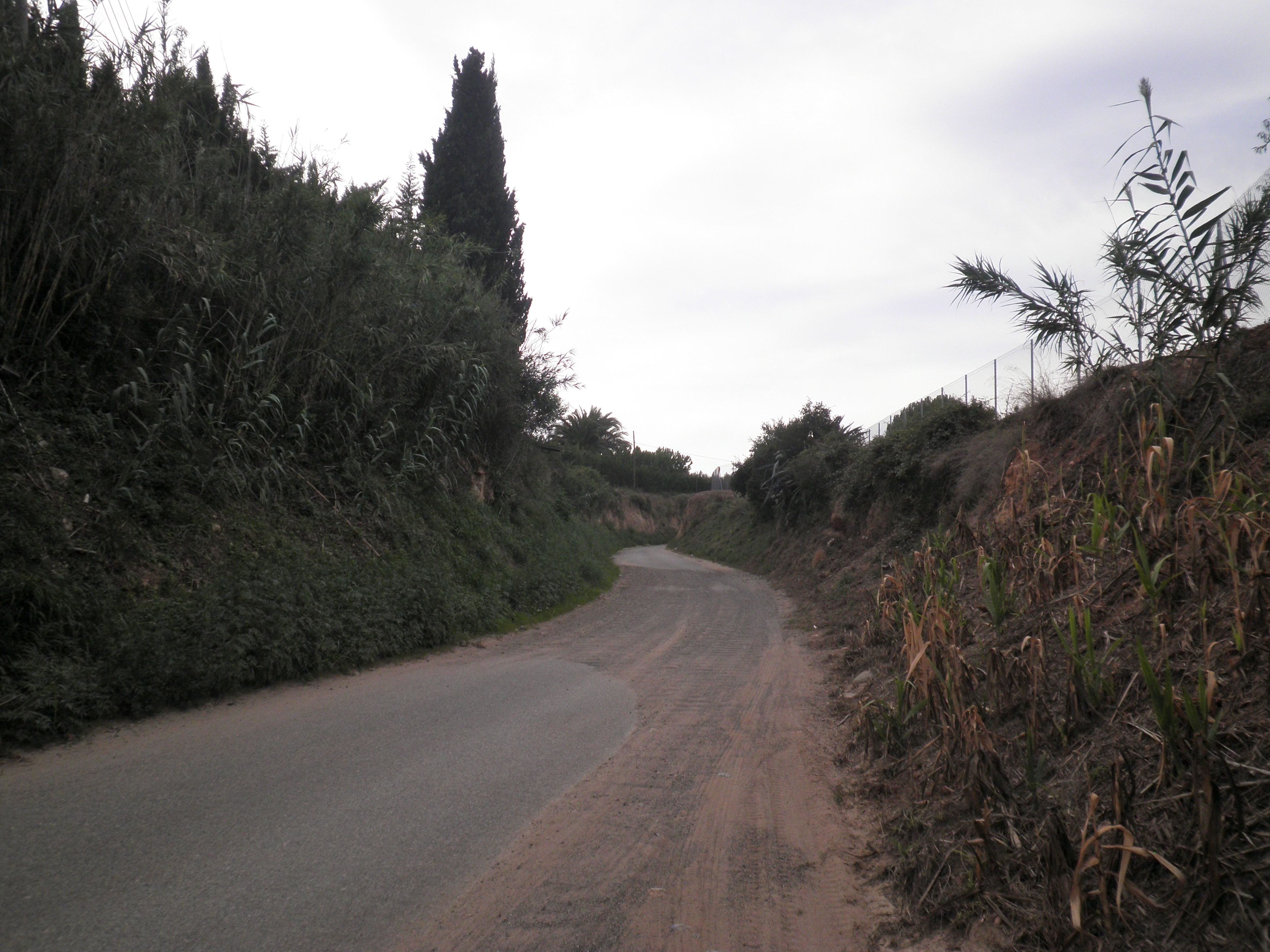 Camí del Roquís, al terme de Reus